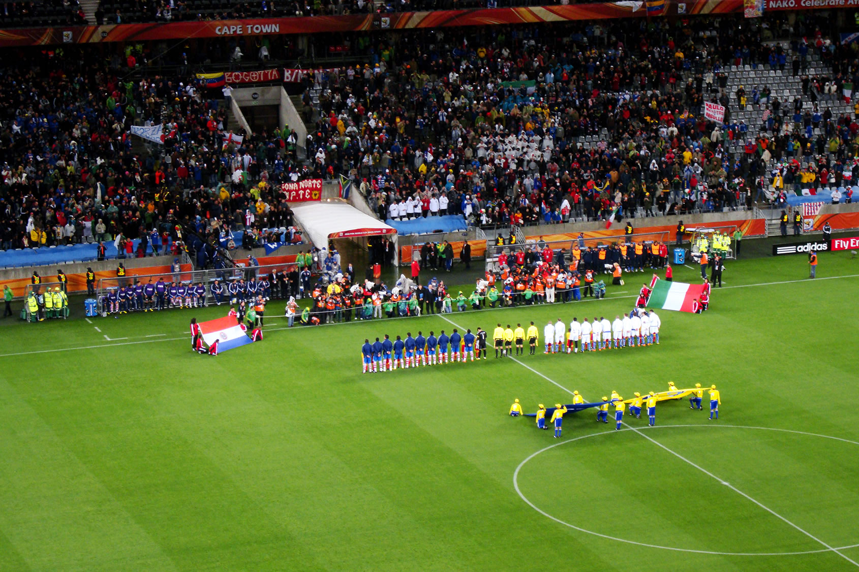 Equipos de Paraguay e Italia en el momento de la entonación de los himnos nacionales de cada país, previo al partido empatado 1:1, por el Grupo F de la Copa Mundial de Sudáfrica 2010.